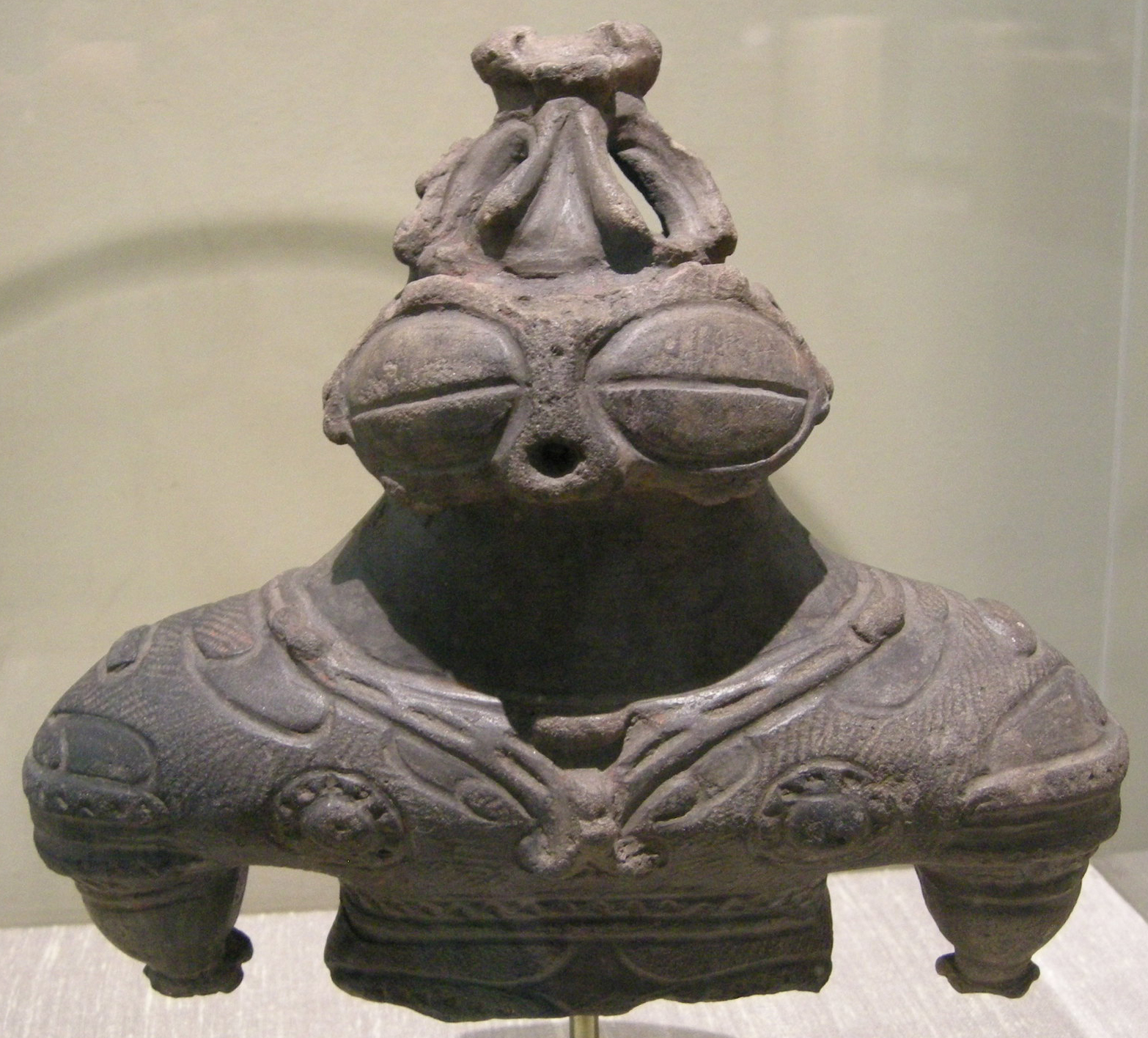 Arte giapponese, doguu, tardo periodo joomon, 100-400 ac.